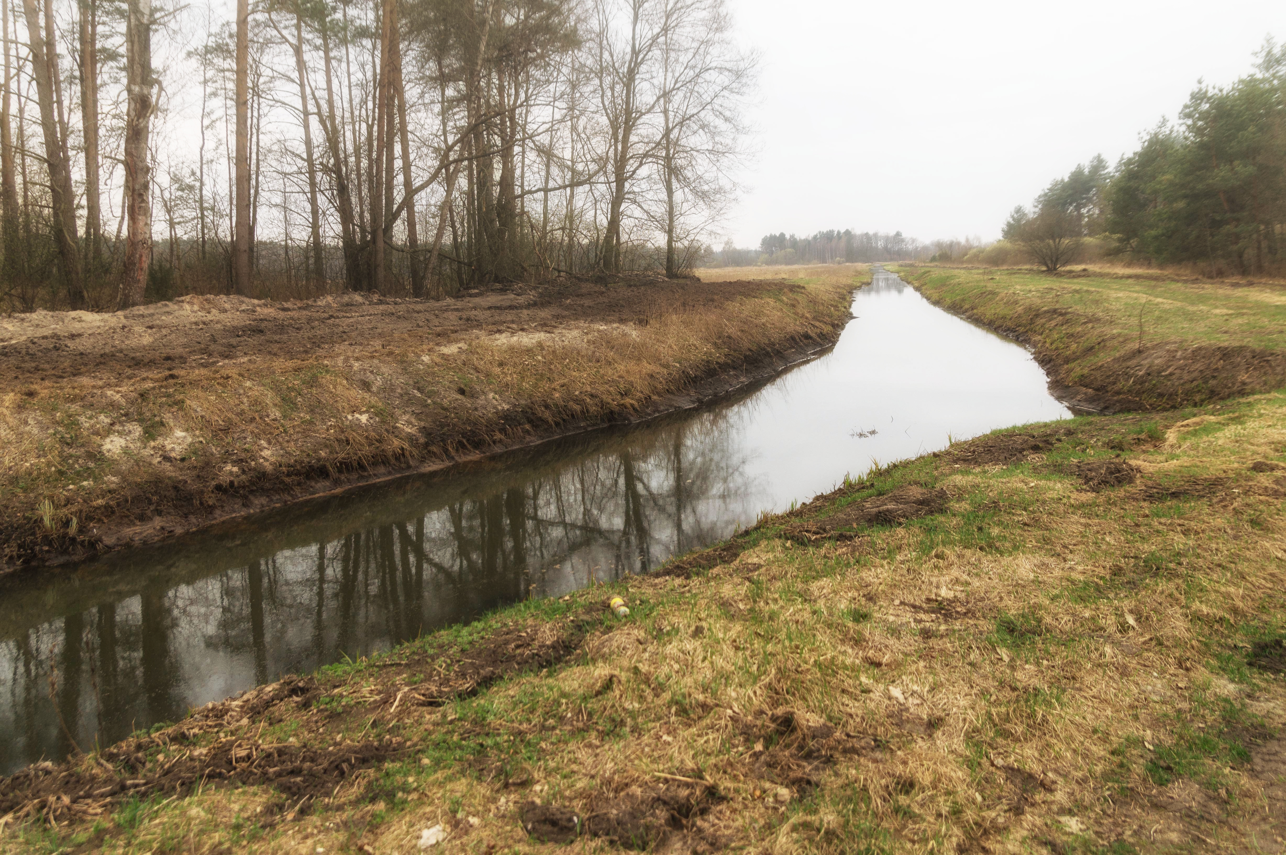 Смердзія перад вусцем